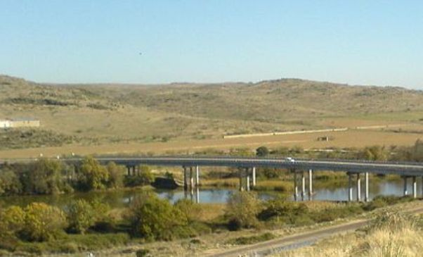 Puente sobre el río Zújar en la EX-115. Versión reducida de la foto tomada por el usuario Alonsoquijano